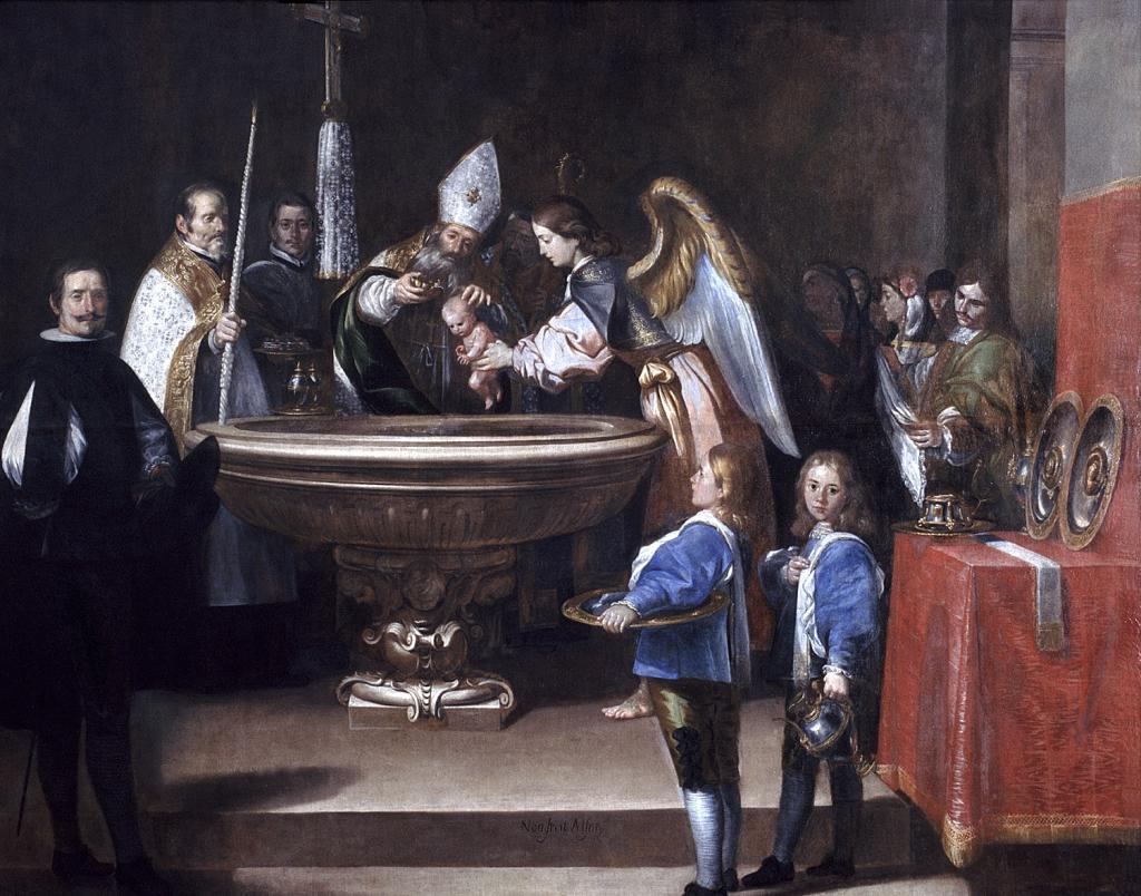 La obra muestra el momento en que San Francisco de Asís, fundador de la Orden de los franciscanos, fue bautizado.